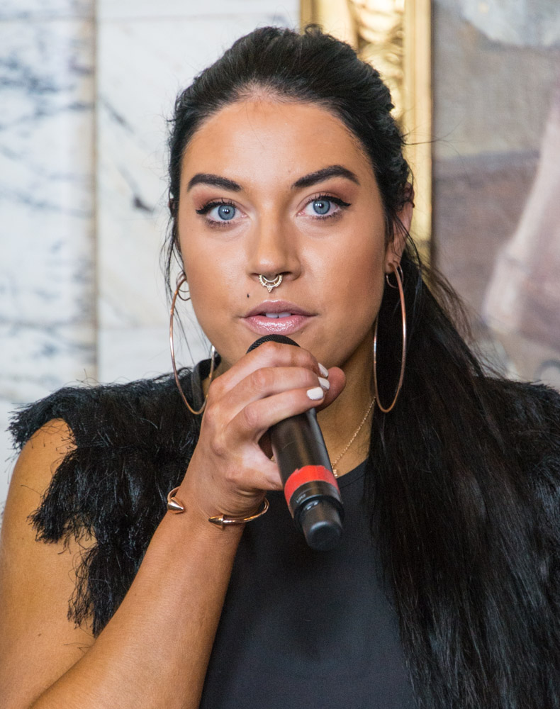 Maxida Märak under Dramatens höstsamling den 18 augusti 2015.